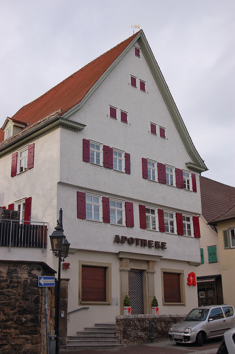 Bartholomäus-Apotheke in Markgröningen, Ostergasse 22